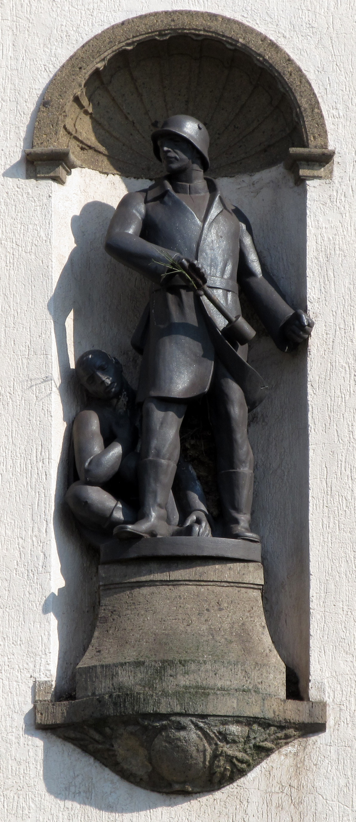 Allegorische Figur der Treue am Außenbau der Versöhnungskirche in Völklingen, Saarland